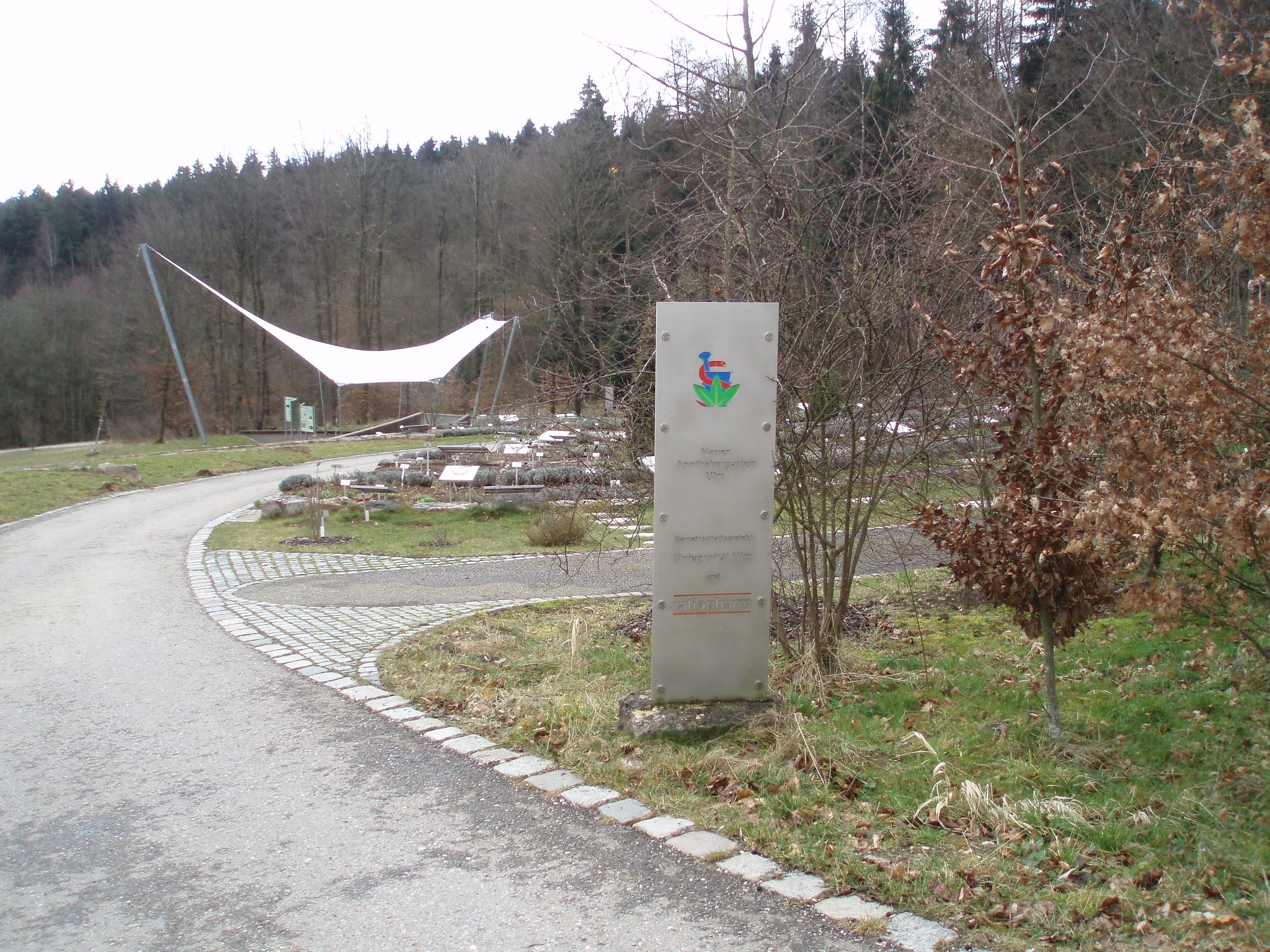 Botanischer Garten Ulm: Neuer Apothekergarten